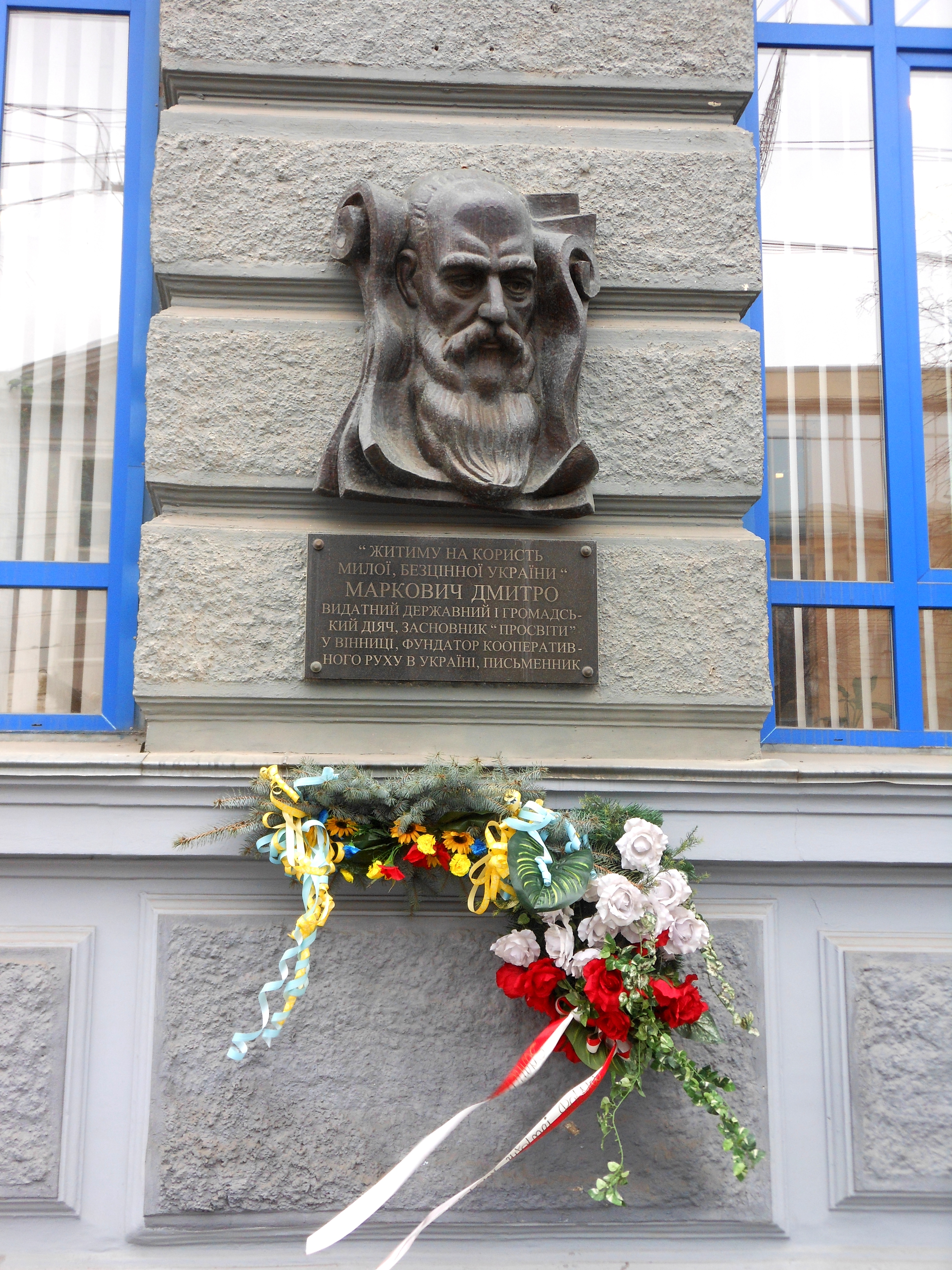 Будинок міської думи, Вінниця, вул. Соборна, 67